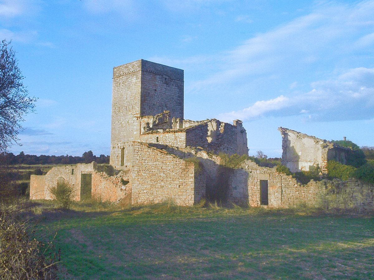 La Sala de Comalats, ruïnes i torre